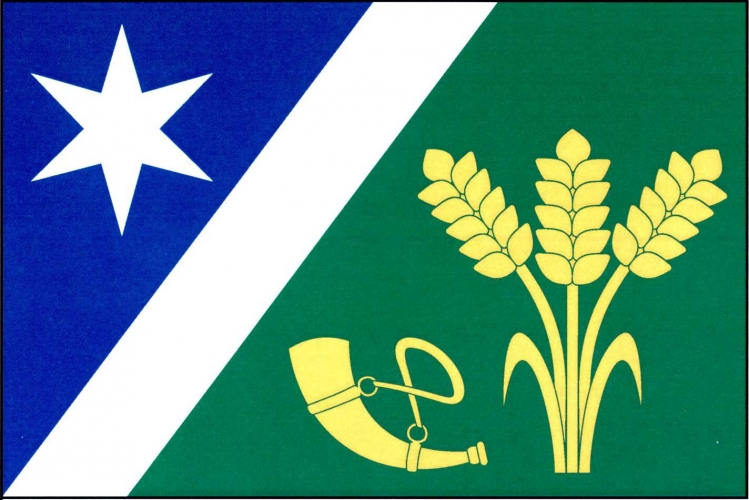 vlajka, Lukavice, okres Rychnov nad Kněžnou